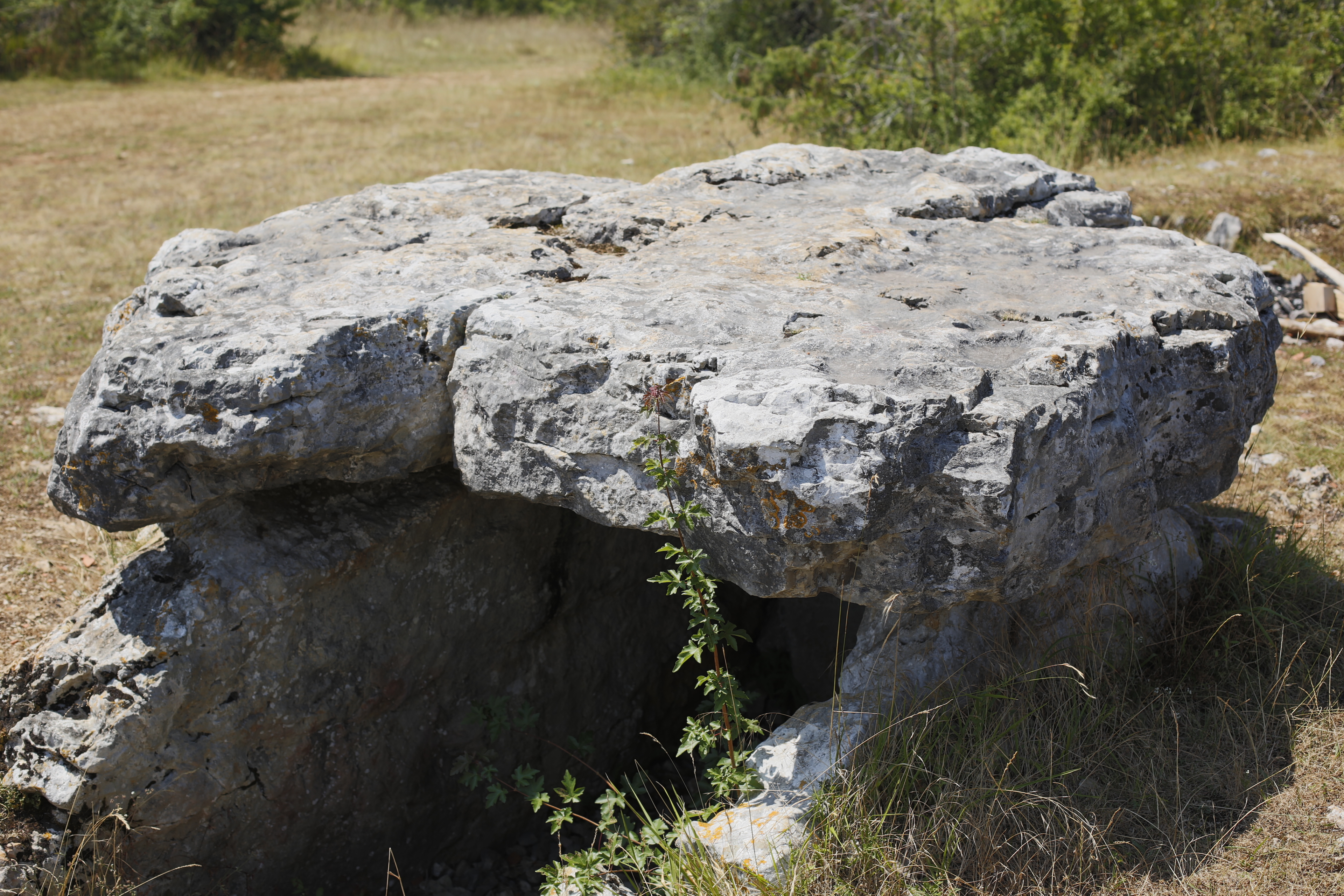 Dolmen de La Palein à Saint-Cernin-de-Larche.